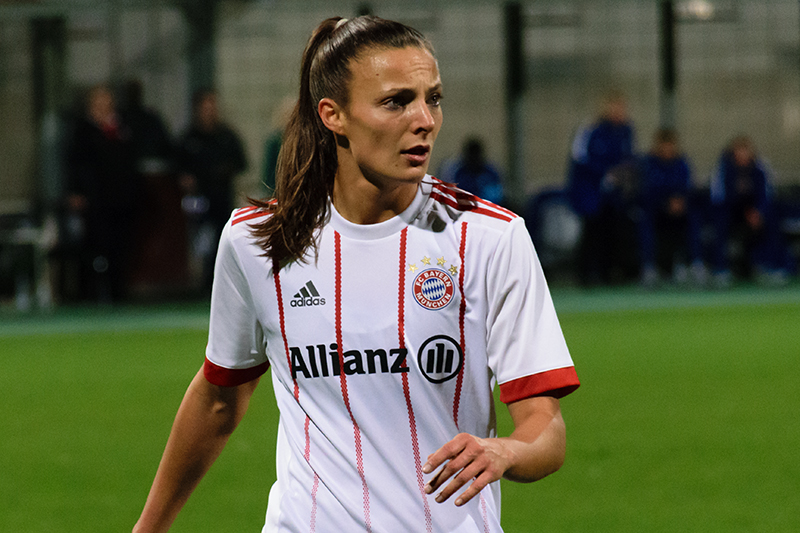 Lucie Voňková